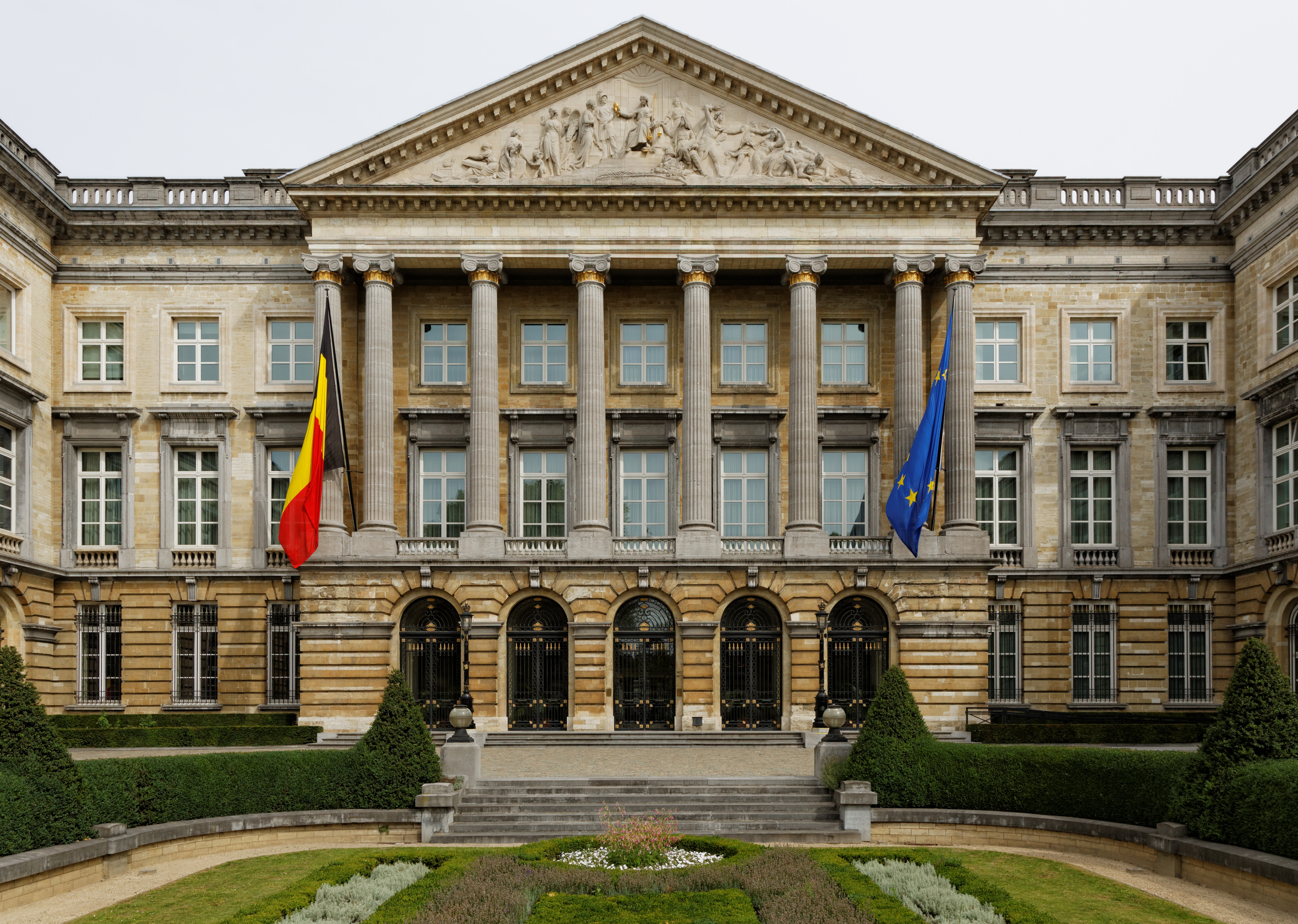 Palais de la Nation, Bruxelles, Belgique